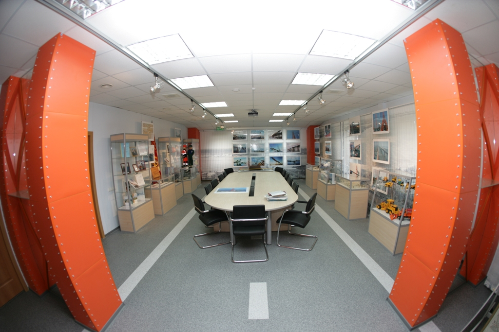 Дизайн интерьера был специально разработан для ГП "Северавтодор"